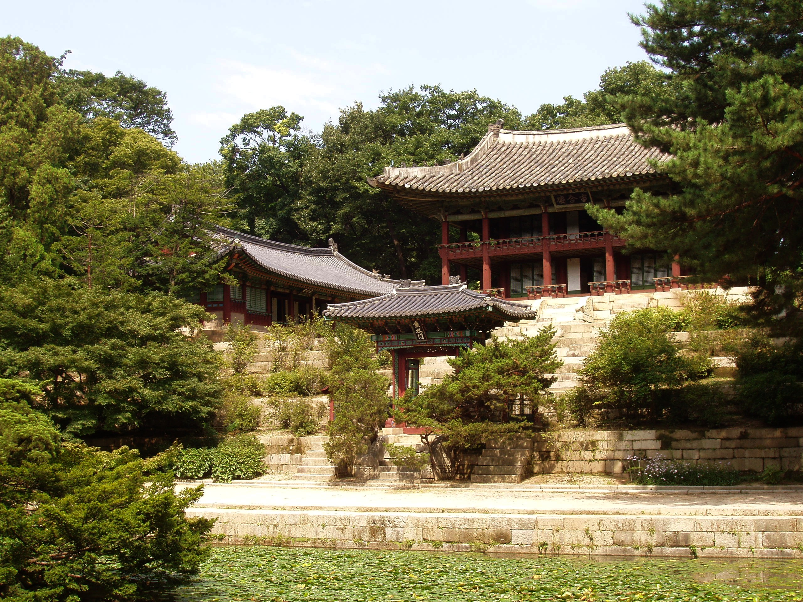 Juhamnu, Changdeokgung - Seoul, Korea.